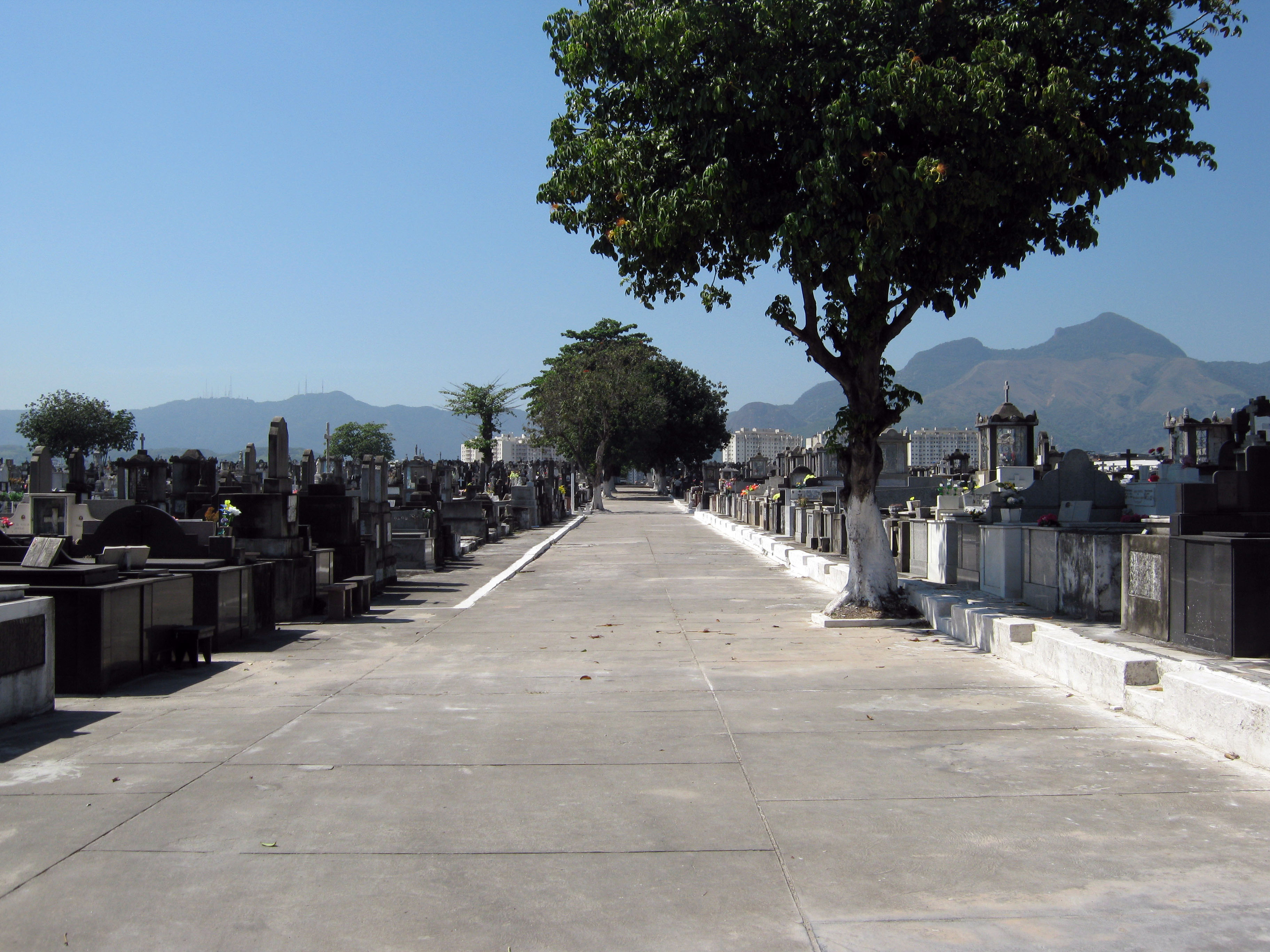 Cemitério de Inhaúma